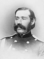 Georg von Alftan